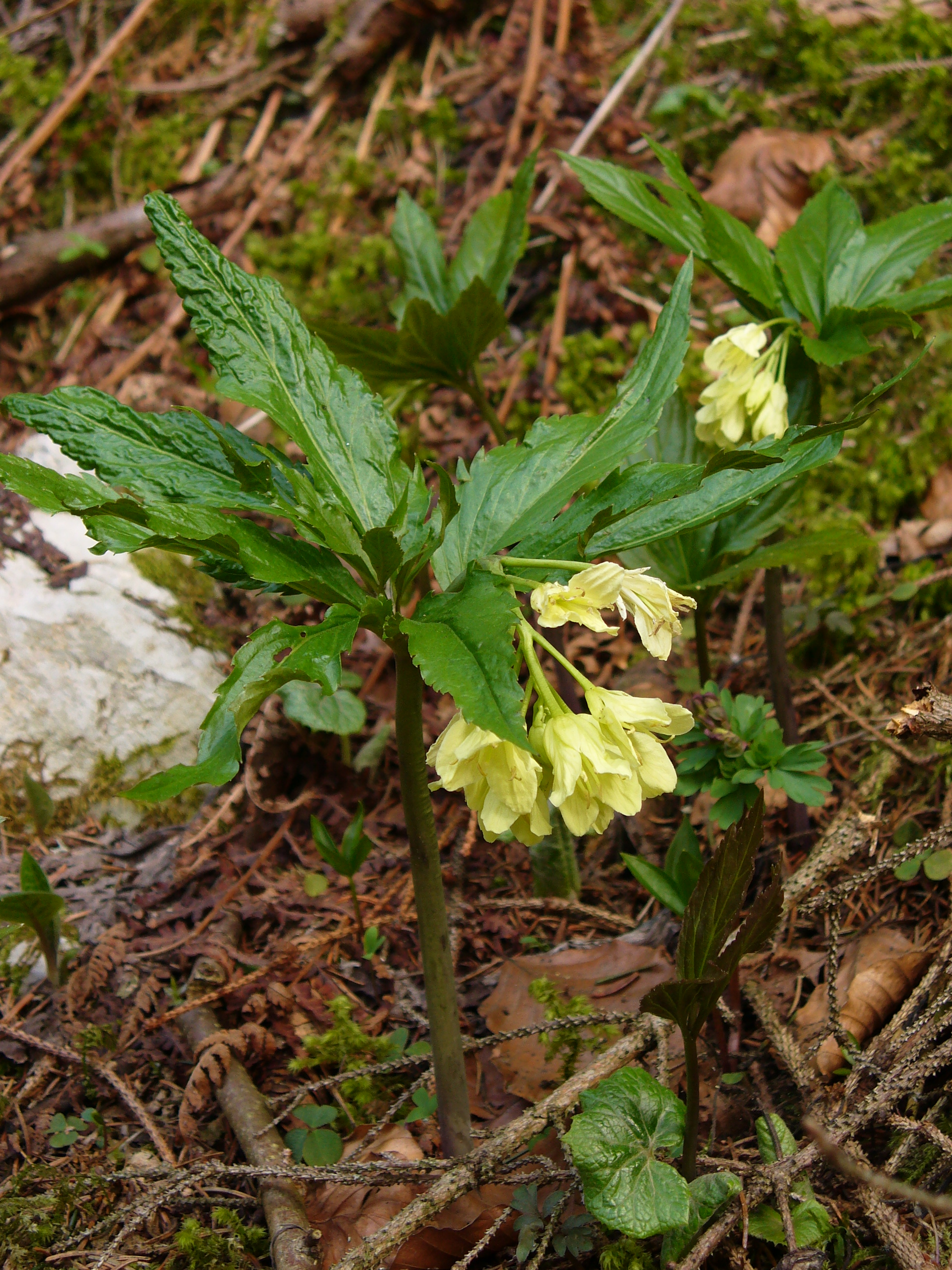 Cardamine enneaphyllos